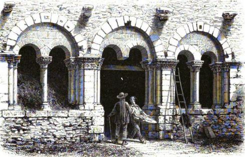 Prieuré Saint Jean du Grais (dortoir) par Casimir Chevalier